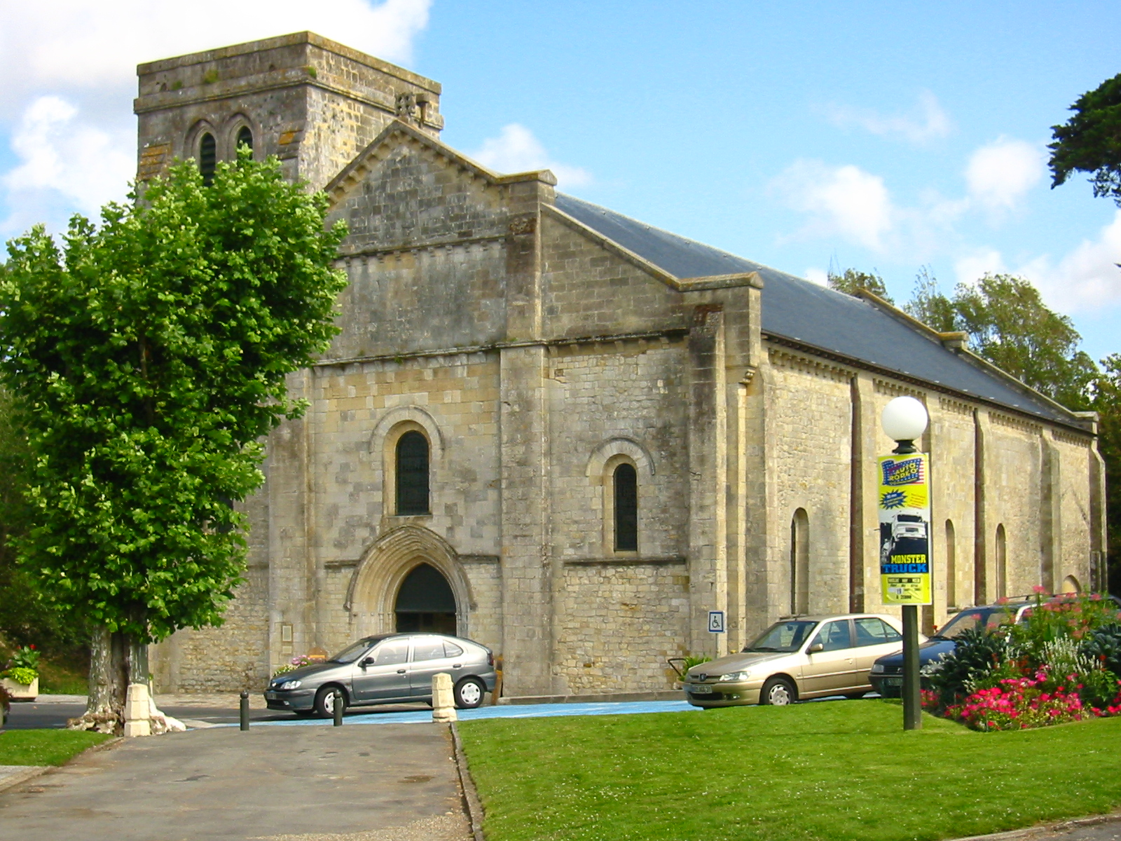 basilique Notre-Dame-de-la-Fin-des-Terres Soulac-sur-Mer